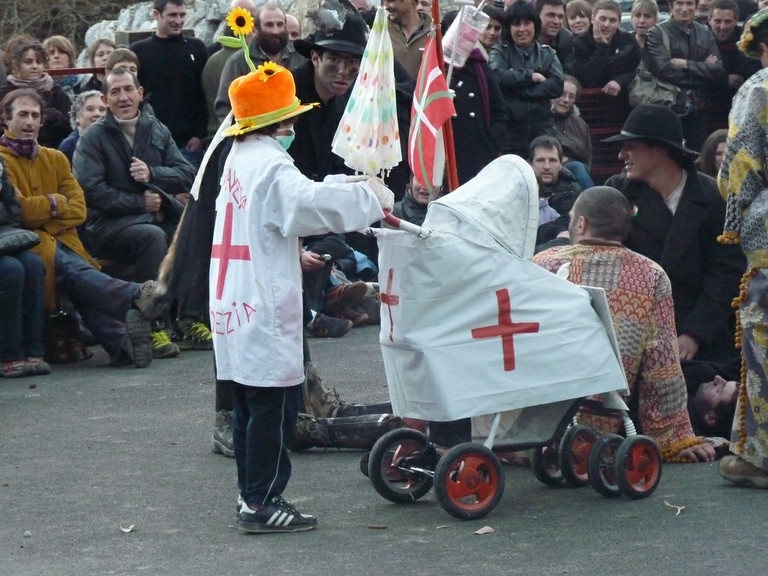 2011n Santa Graziko gazteek kaleratu zituzten maskaradak. Hamazazpi urte igaroak ziren herri honek azken maskarada eman zuenetik. Lehenengo emankizuna, ohiturari jarraituz, Santa Grazin bertan izan zen (2011-02-06). Irudian bedezia.